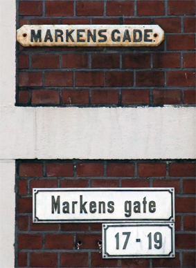 Gateskilt i Markens gate 2009